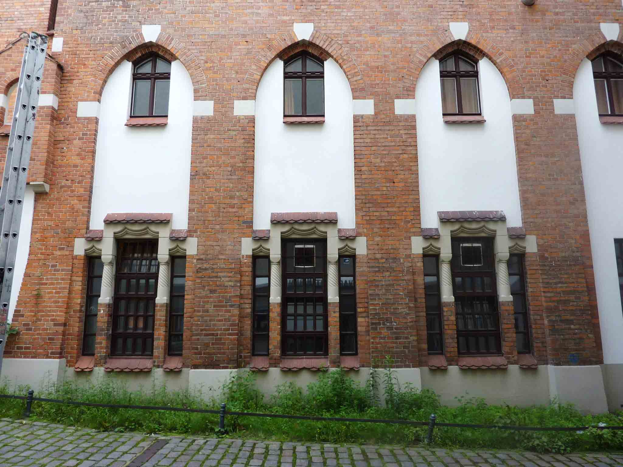 Wilde Bühne Berlin Aussenfassade Theater des Westens Kantstrasse 12